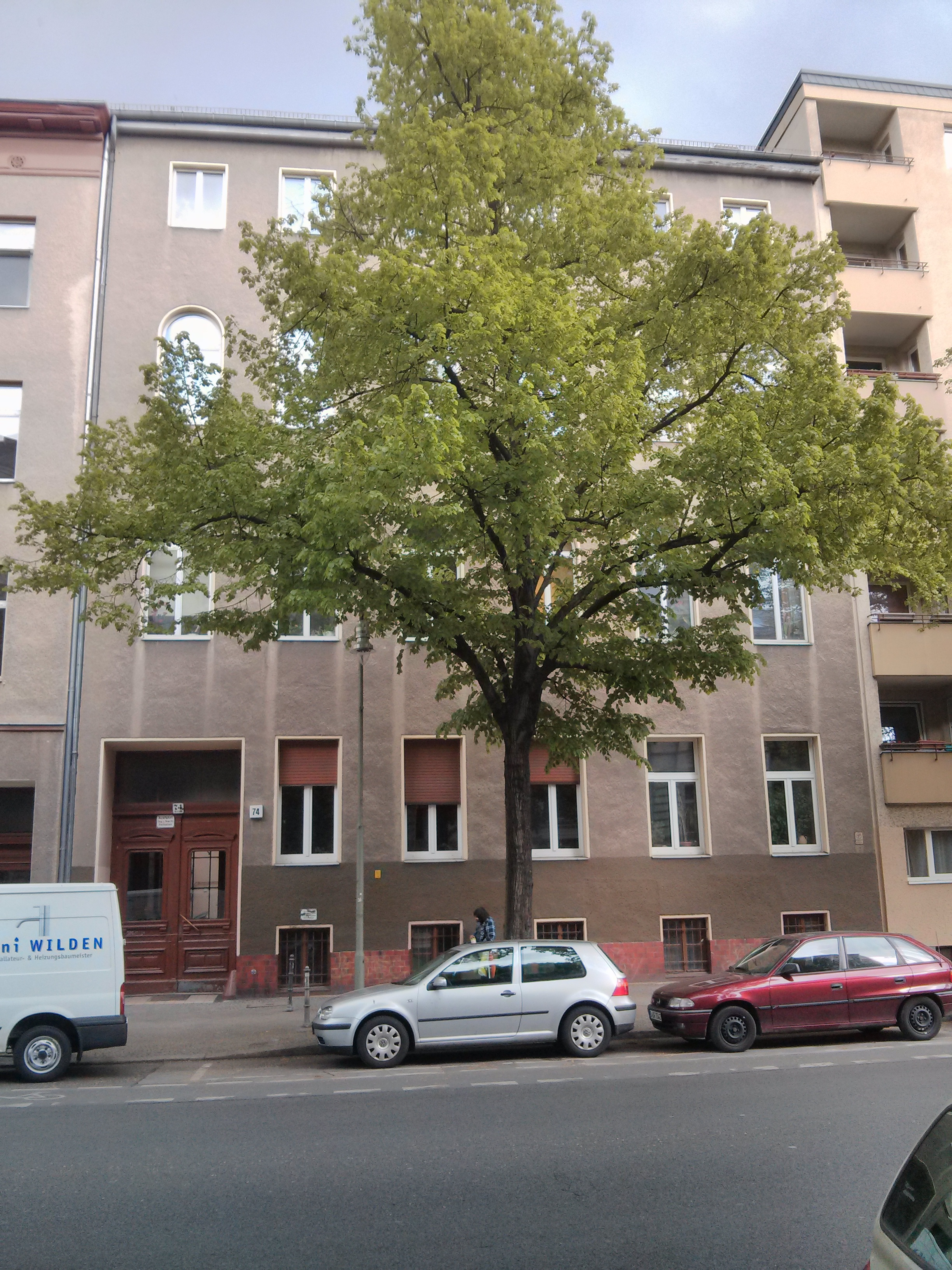 Grossbeerenstrasse 74, Berlin, ehemals in den 1920er Jahren Sitz der BIF von Selli Engler und deren vermutliche Privatadresse.